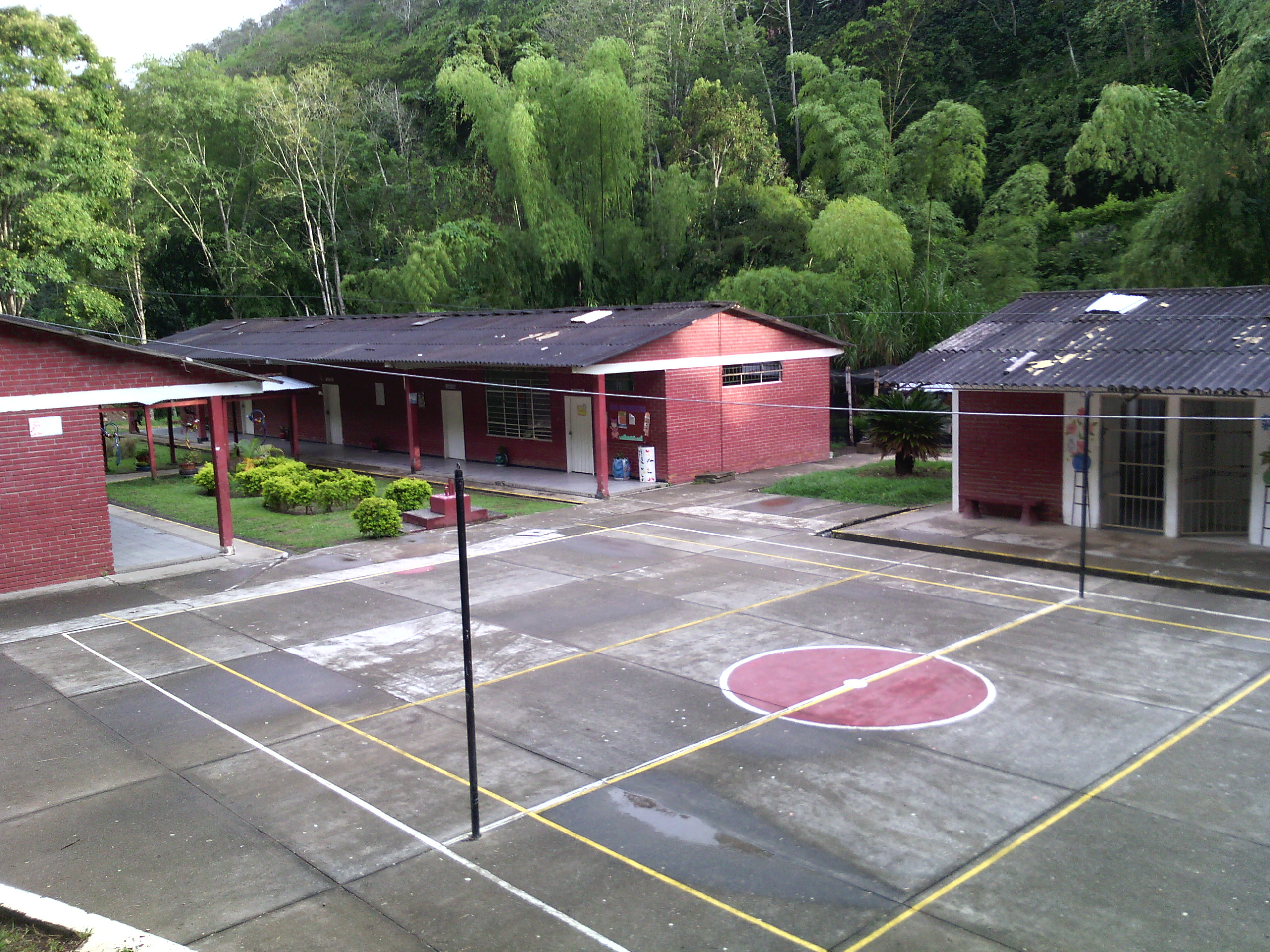 Institución Educativa Santiago Gutiérrez Ángel. Argelia, Valle del Cauca, Colombia.